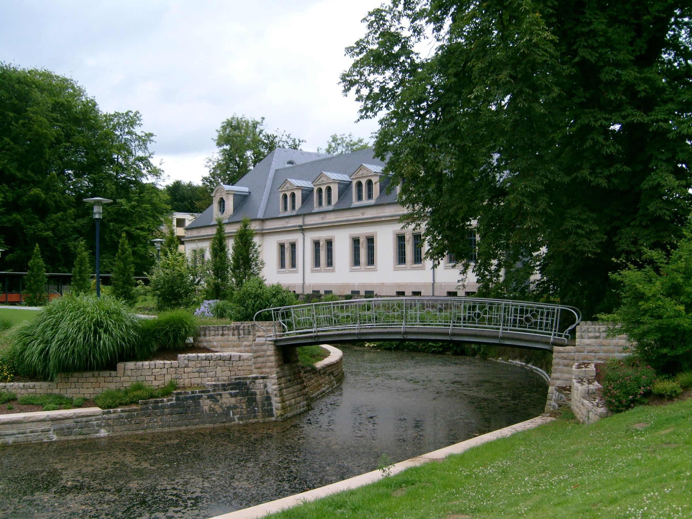 Sujet : Vue vum Park op déi al Thermen zu Munneref. 21. Juni 2008. Kategorie:Parken zu Lëtzebuerg